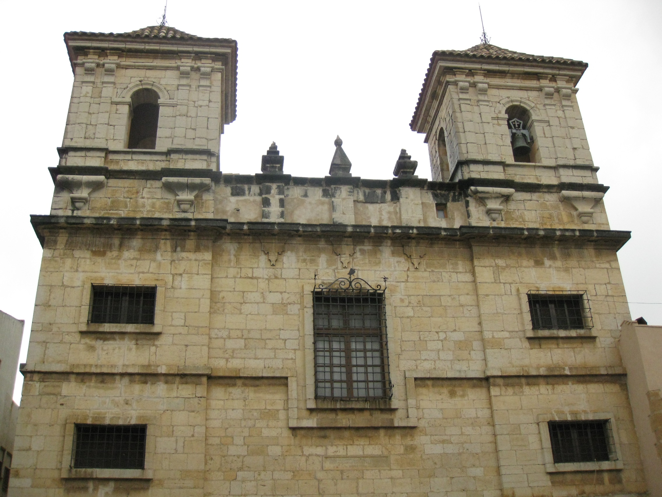 Monestir de Santa Anna (Sant Mateu) 03.100-001.